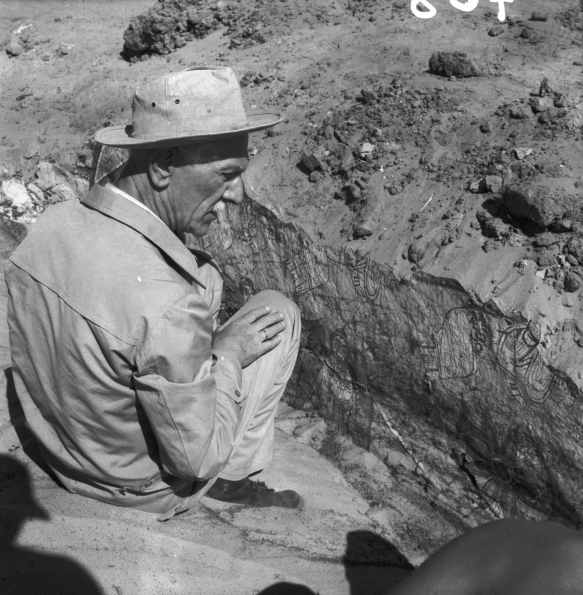 Wykopaliska w Faras. Na zdjęciu prof. Kazimierz Michałowski